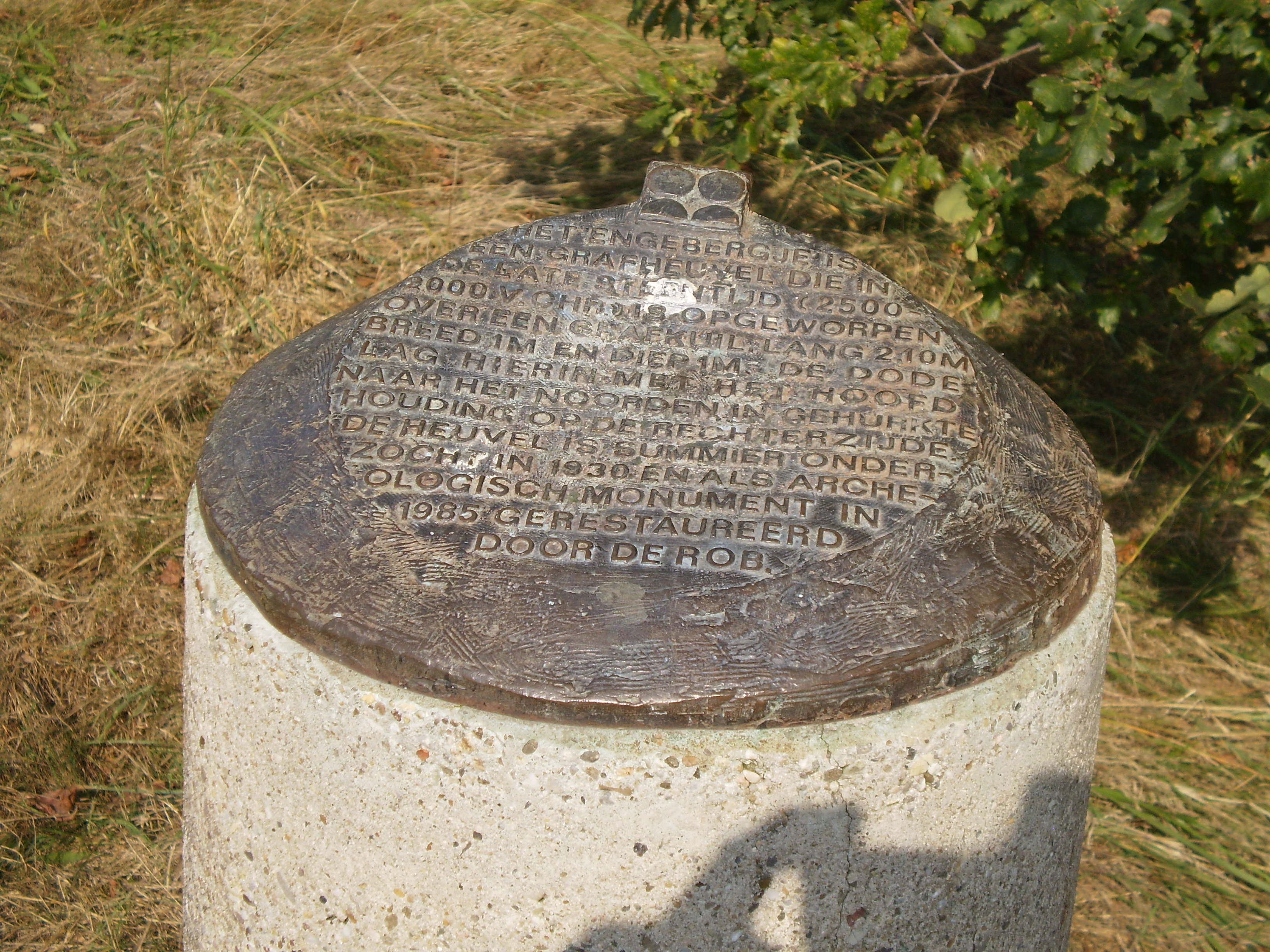 Soest peal Enghenbergje